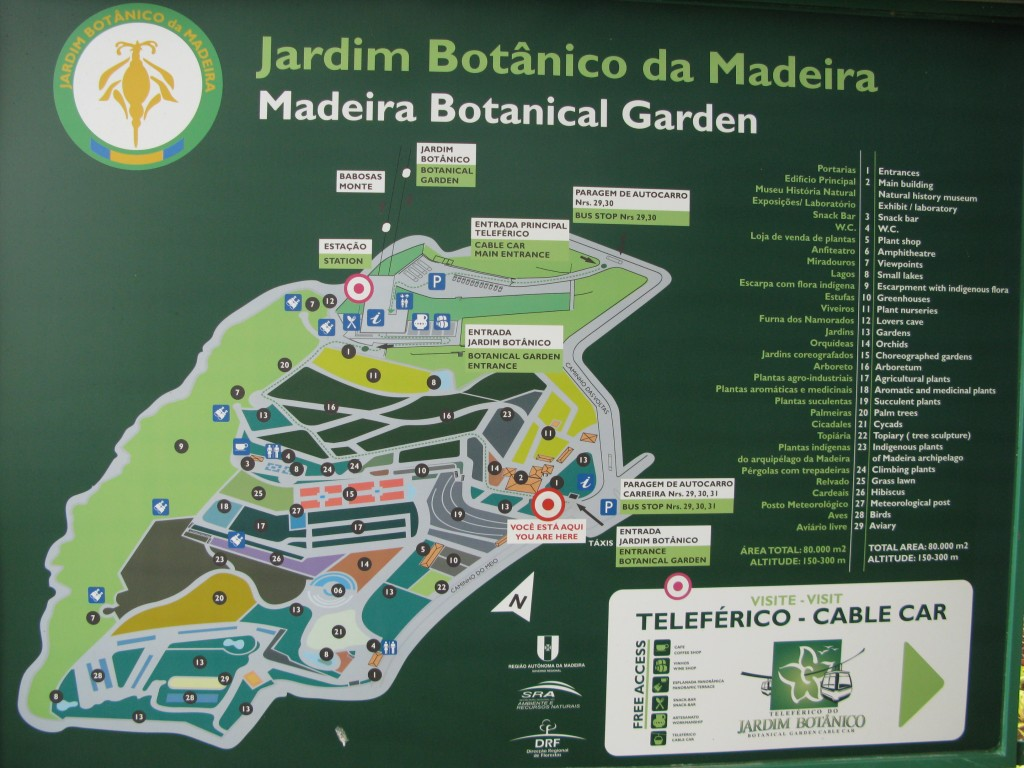 Madeira botanical garden, Funchal , Madeira 2008.